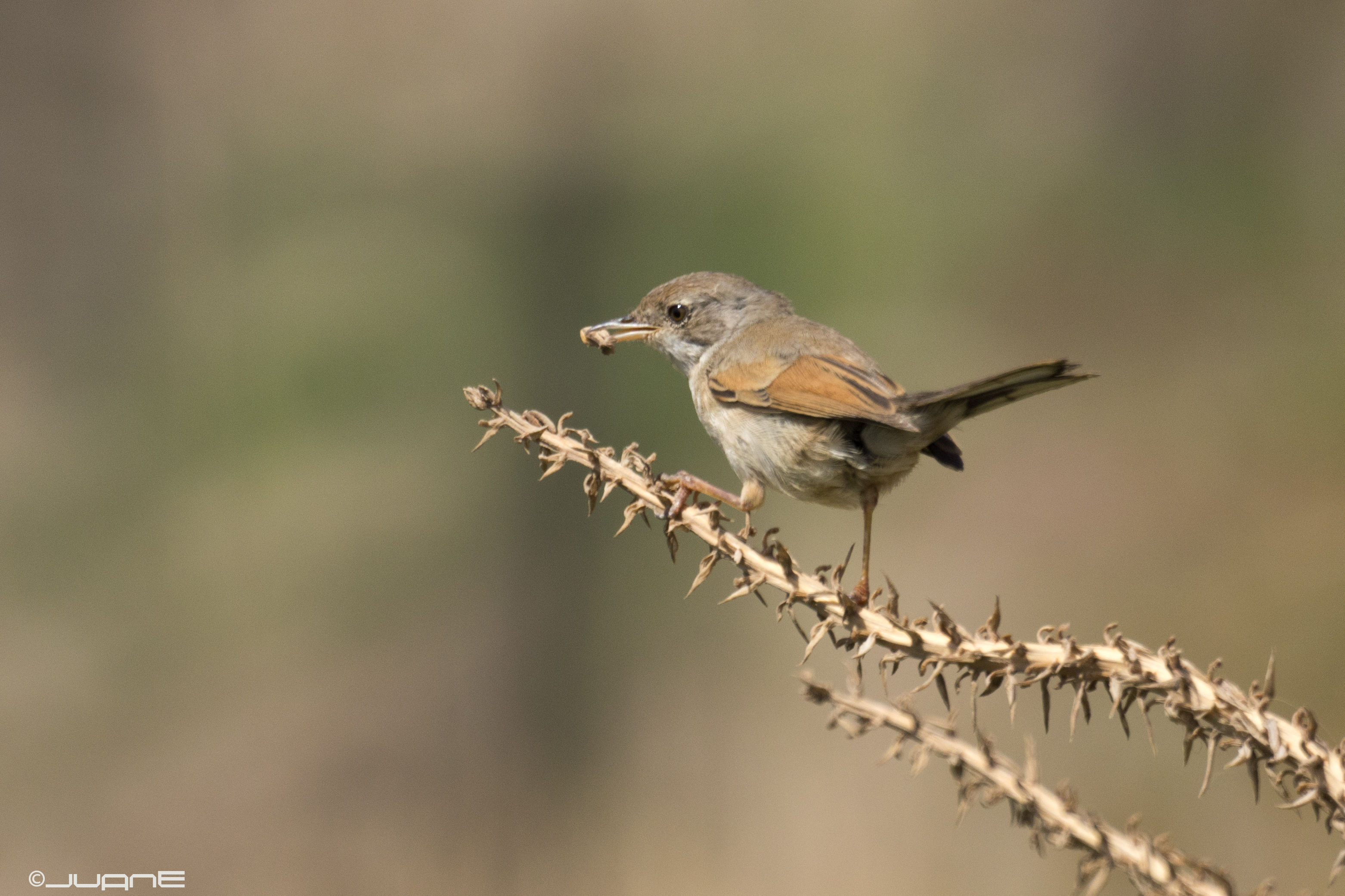 Sylvia conspicillata orbitalis